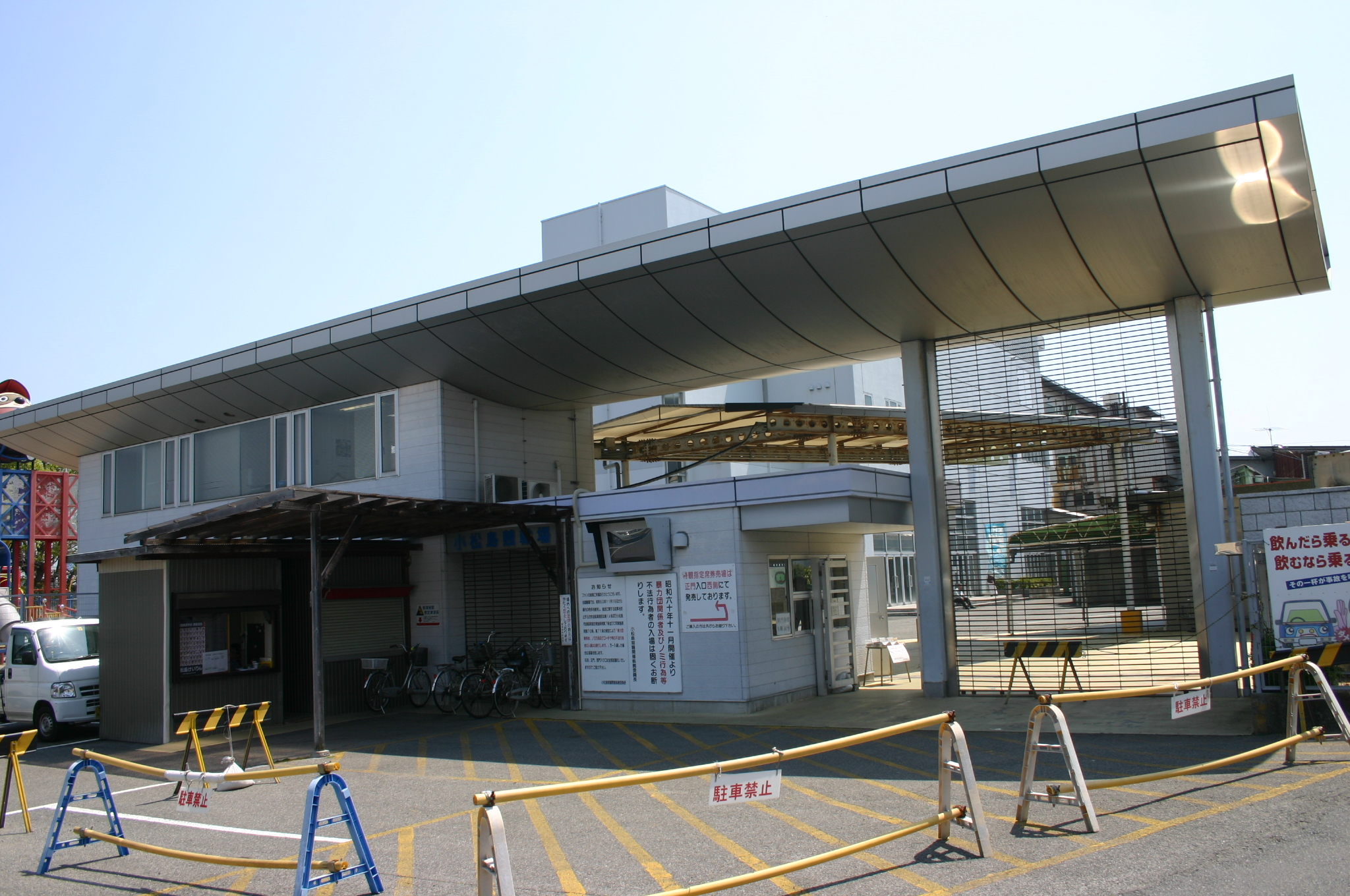 小松島競輪場入口